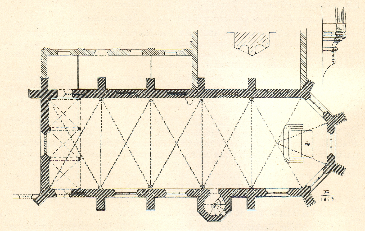 Frauweiler_ehemalige_Klosterkirche